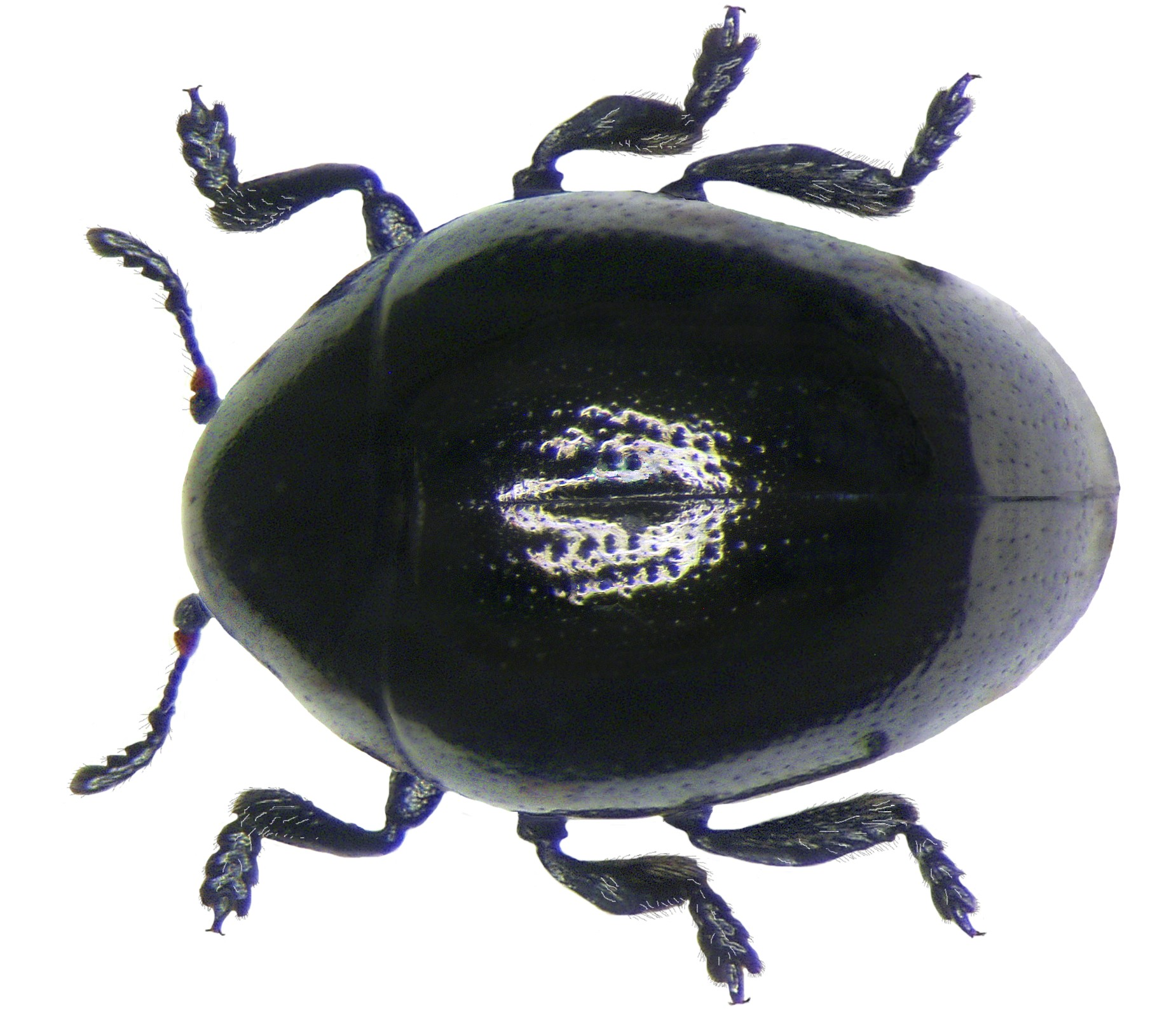 Oomorphus concolor Curtis, 1831 Familie: Chrysomelidae Grösse: 2-2,8 mm Verbreitung: Europa Ökologie: an Aegopodium podagaria Fundort: Austria, Leitha-Gebirge leg.det. U.Schmidt, 1975 Foto: U.Schmidt, 2007